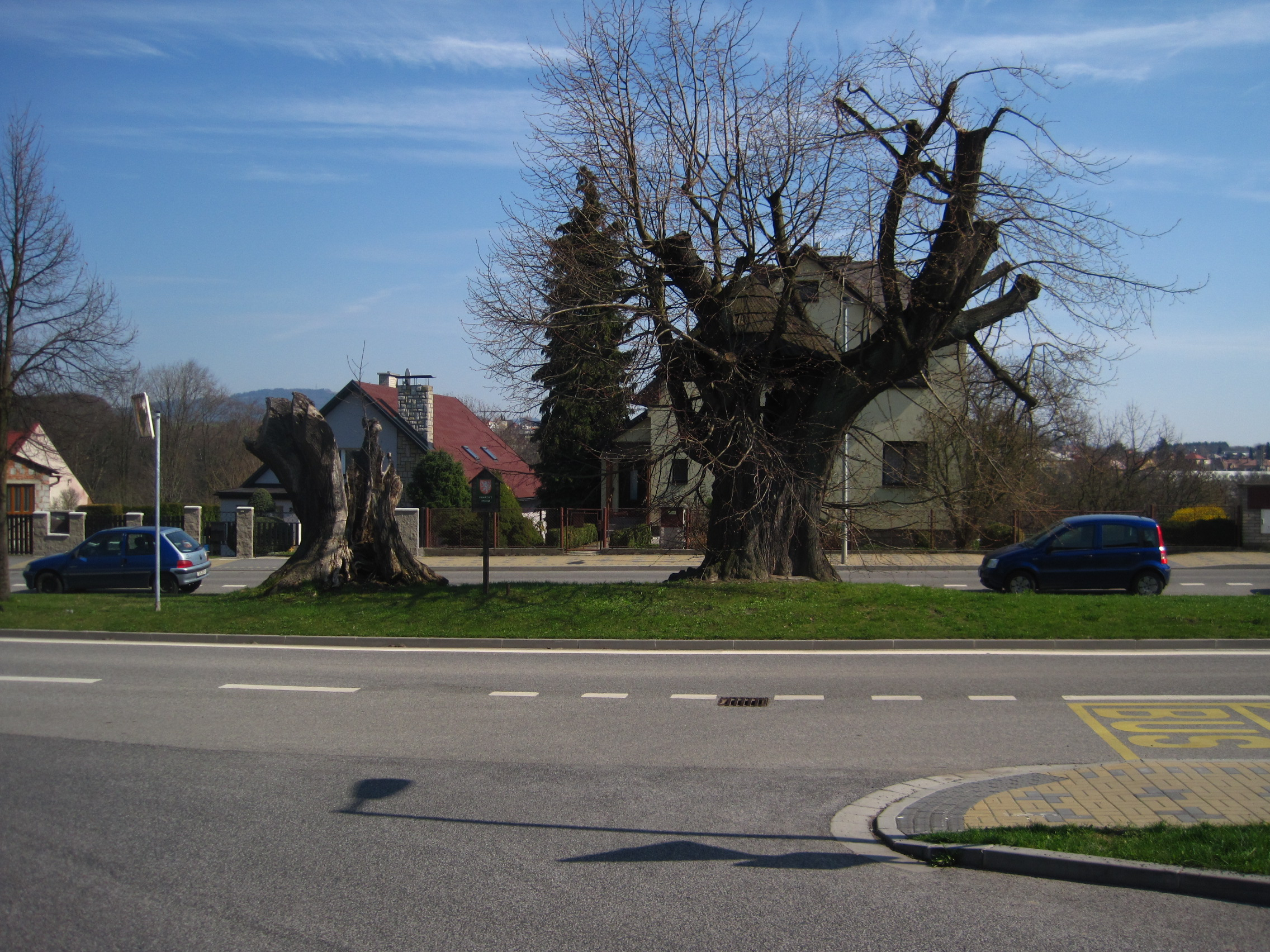 Památná Daliměřická lípa nedaleko zámku Hrubý Rohozec v ostrůvku silnice